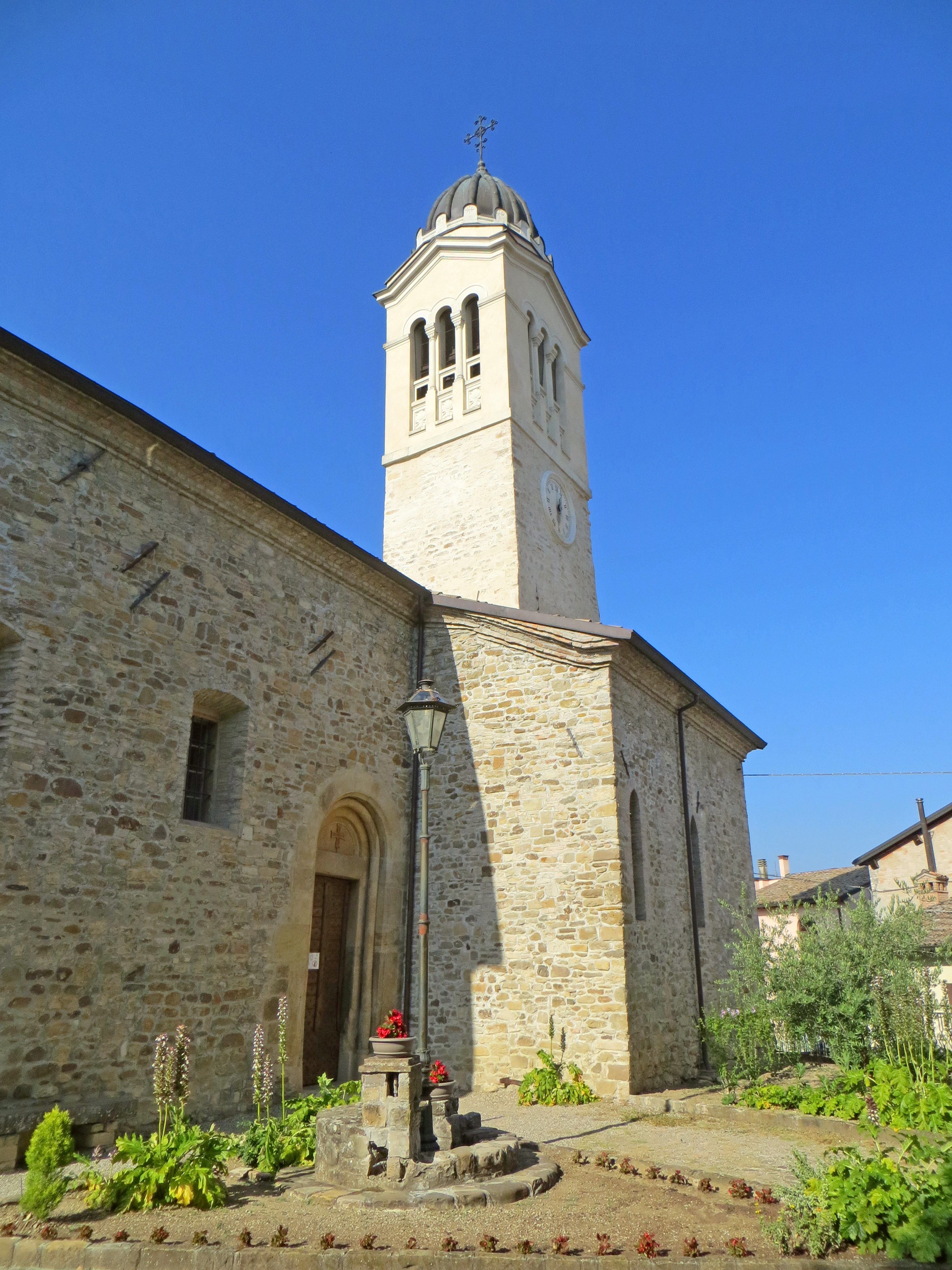 Chiesa di San Michele Arcangelo (Lesignano de' Bagni) - lato sud e campanile